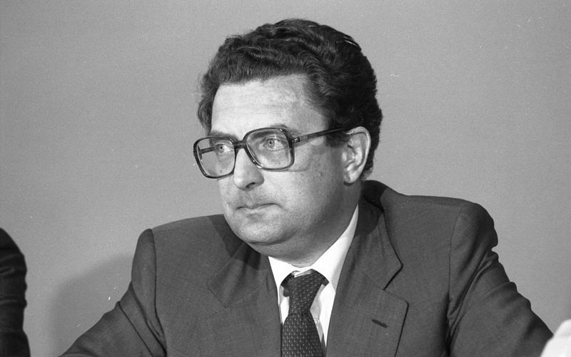 Pressekonferenz der Innenminster der Länder mit Bundesminister Gerhard Rudolf Baum im Bundesrat